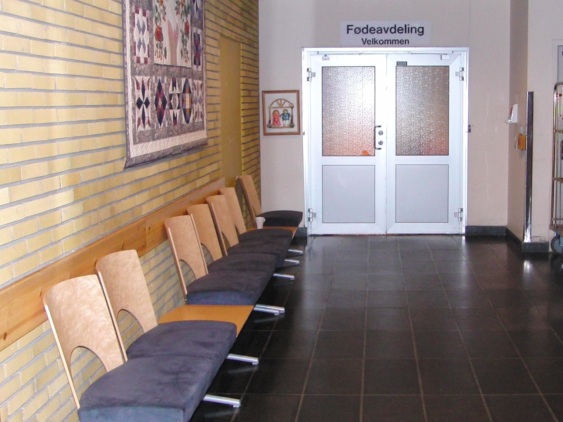 Description=Kvinneklinikken (Haukeland Universitetssykehus)